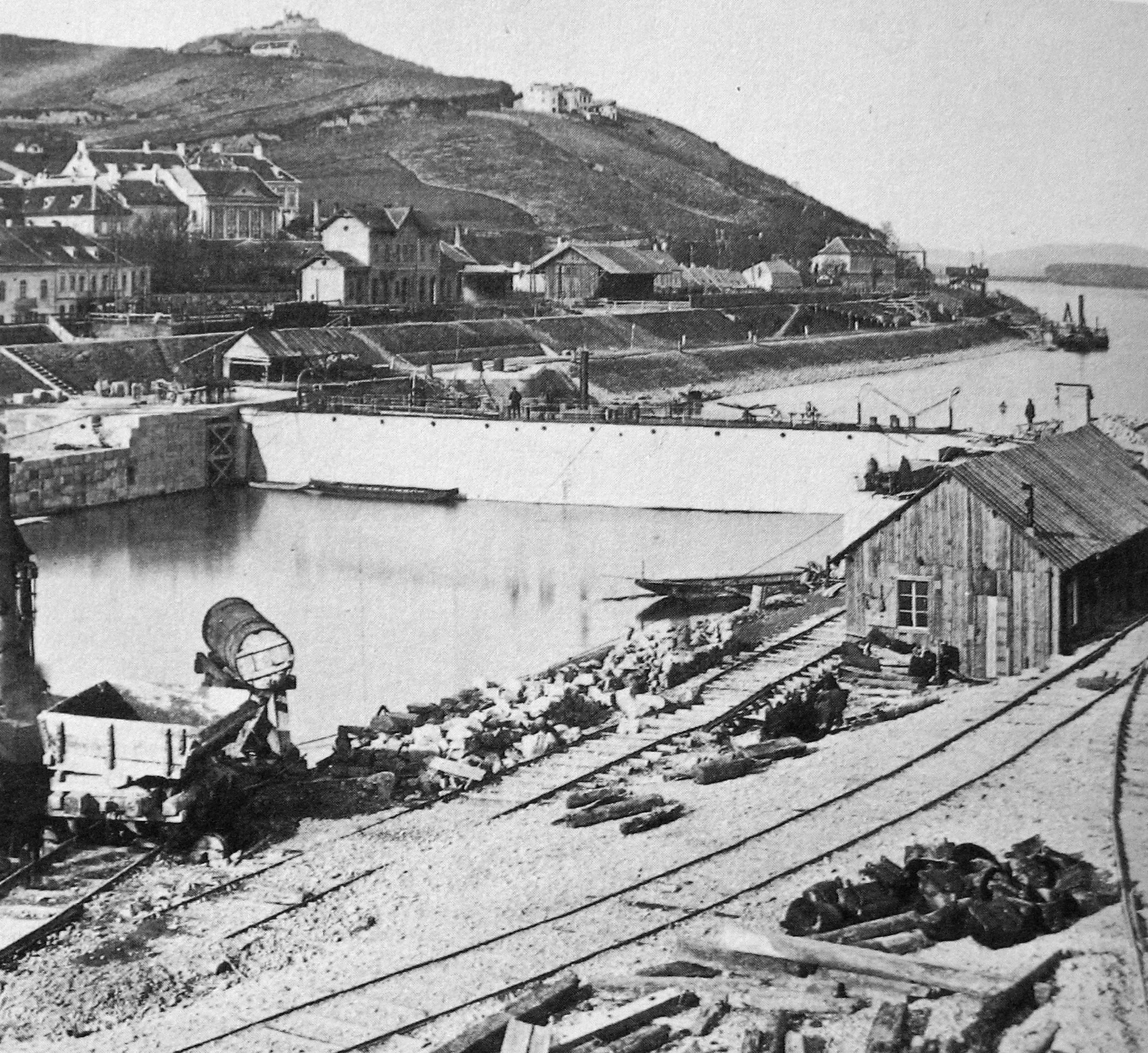 Wien, Sperrschiff, 1873